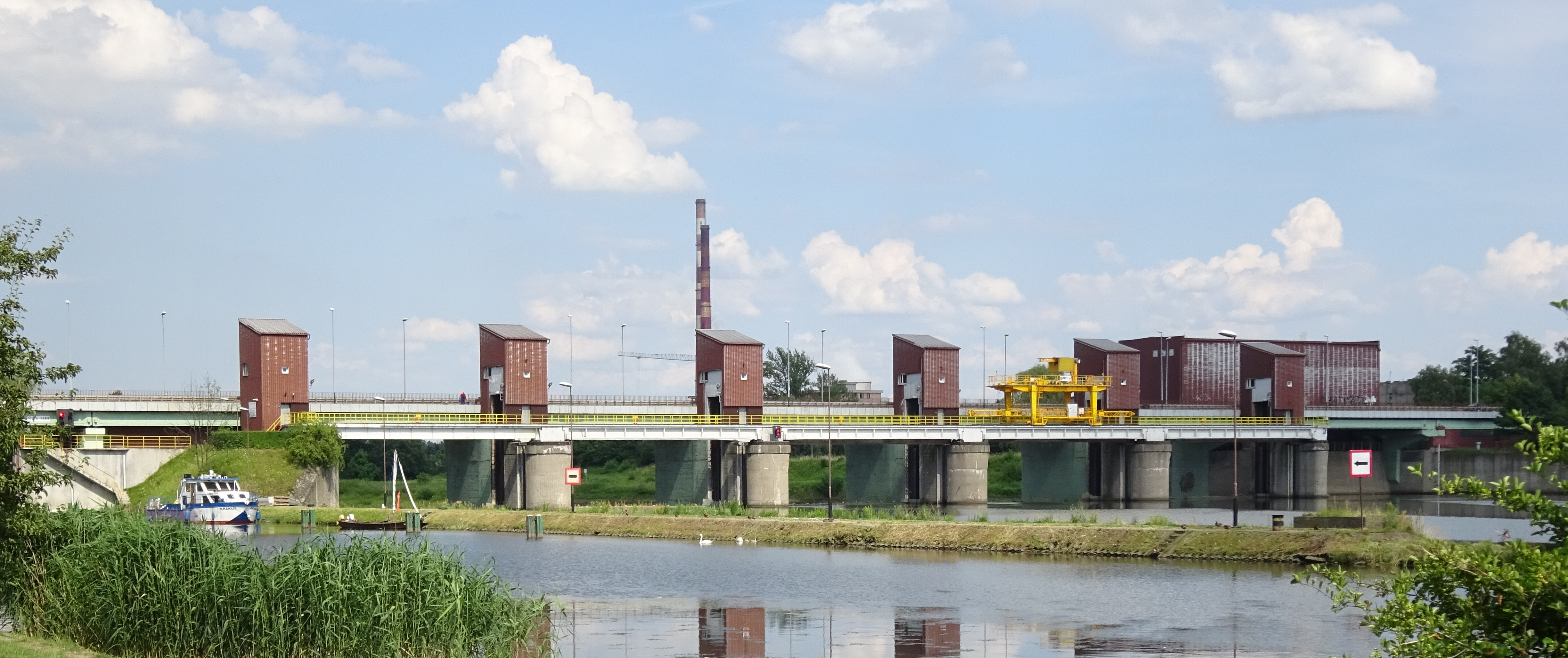 Stopień Wodny Dąbie w Krakowie. Widok z zachodu.